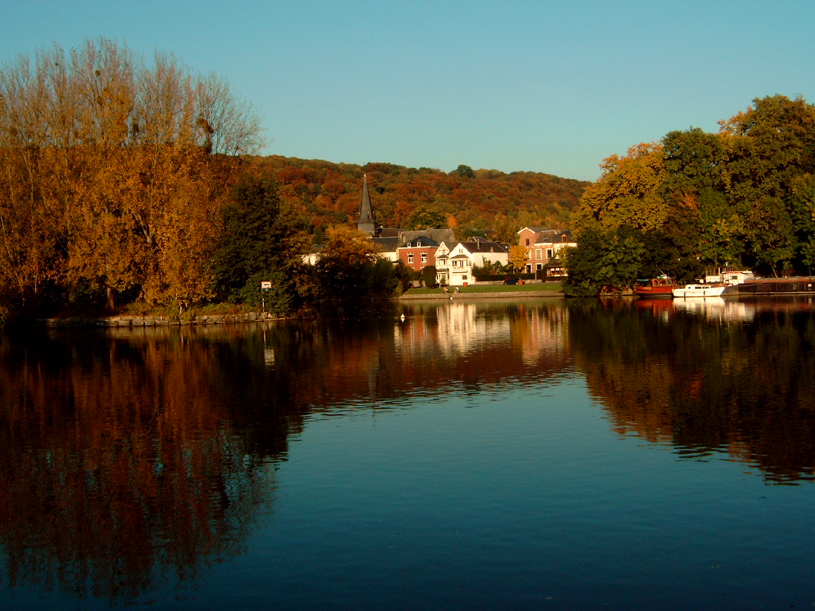 Dave, nabij Namen. Eigen opname, hersft 2005.